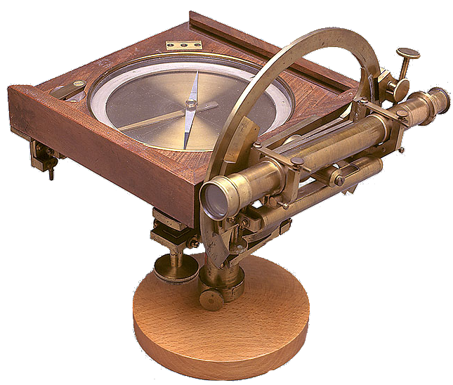 éclimètre du 19ème siècle